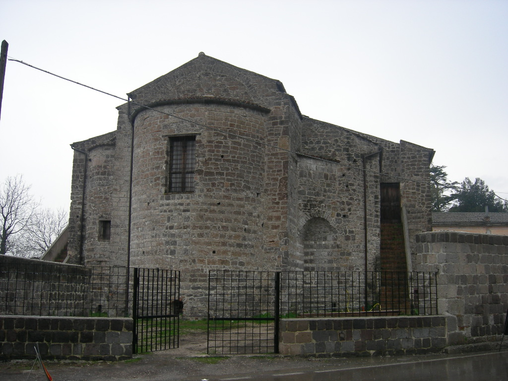 Vista posteriore dell'Abbazia del santissimo Salvatore a San Salvatore Telesino (BN)